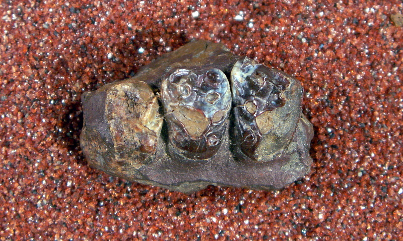 Ectoconus symbolus Gazin